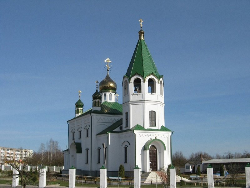 Фаніпаль. Царква